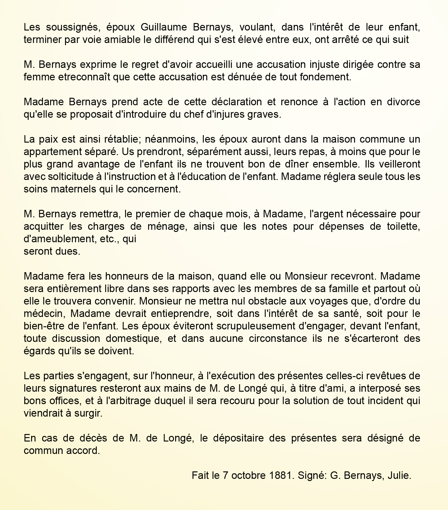 Convention passée entre les époux Bernays le 7 octobre 1881 (source BNF - Albert Bataille)